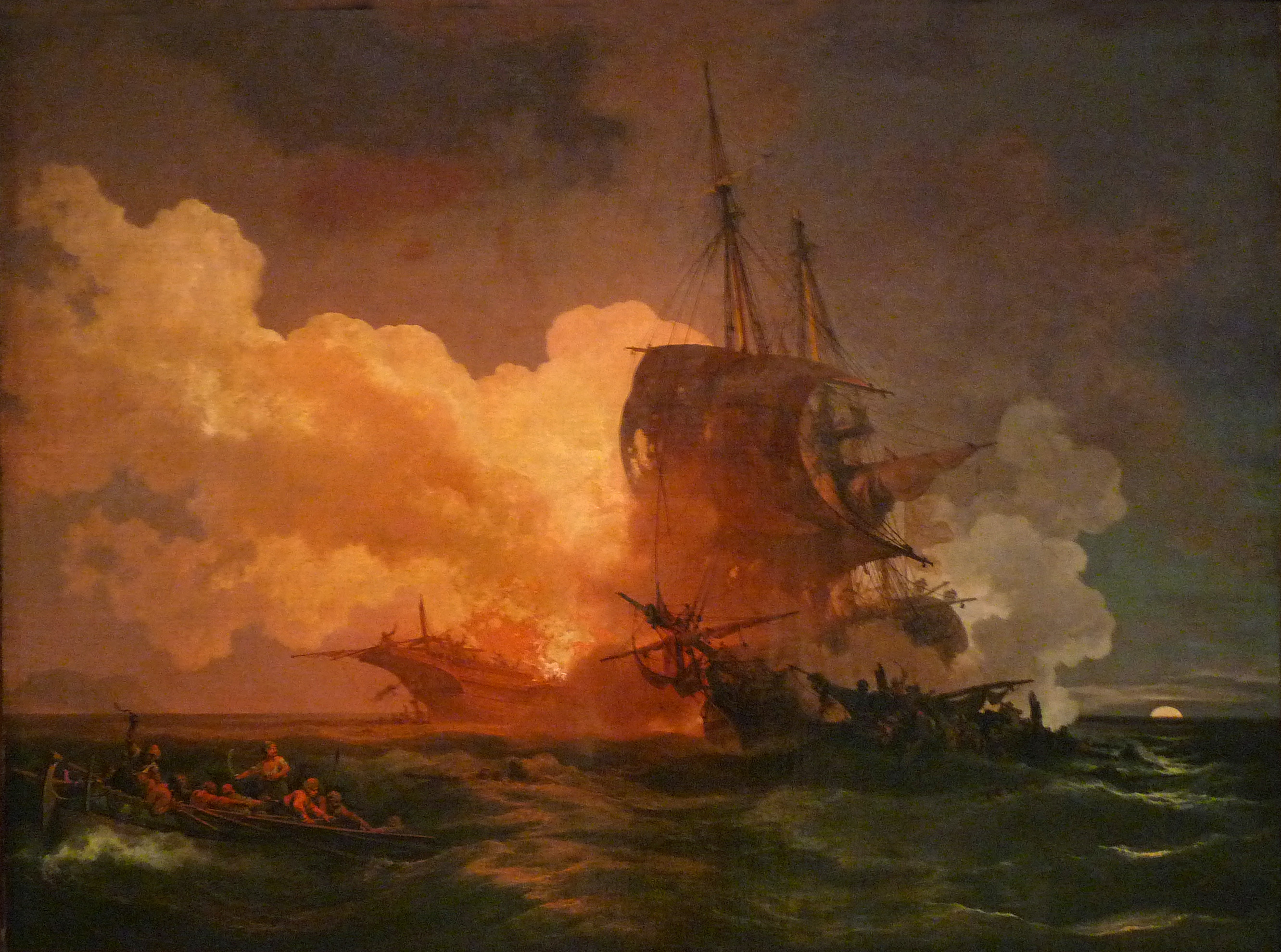 Combat naval or